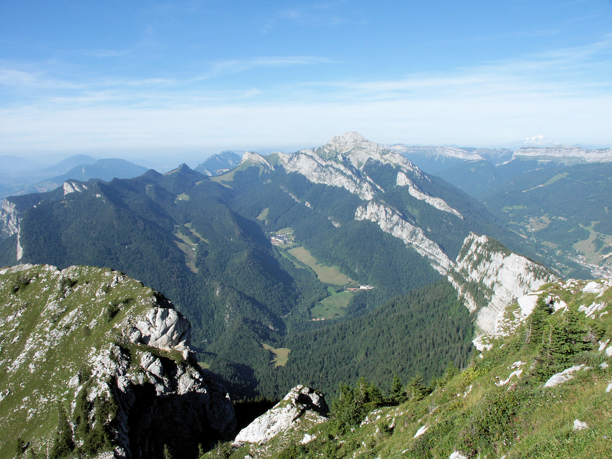 Le Grand Som depuis le Charmant Som, avec le Grande-Chartreuse